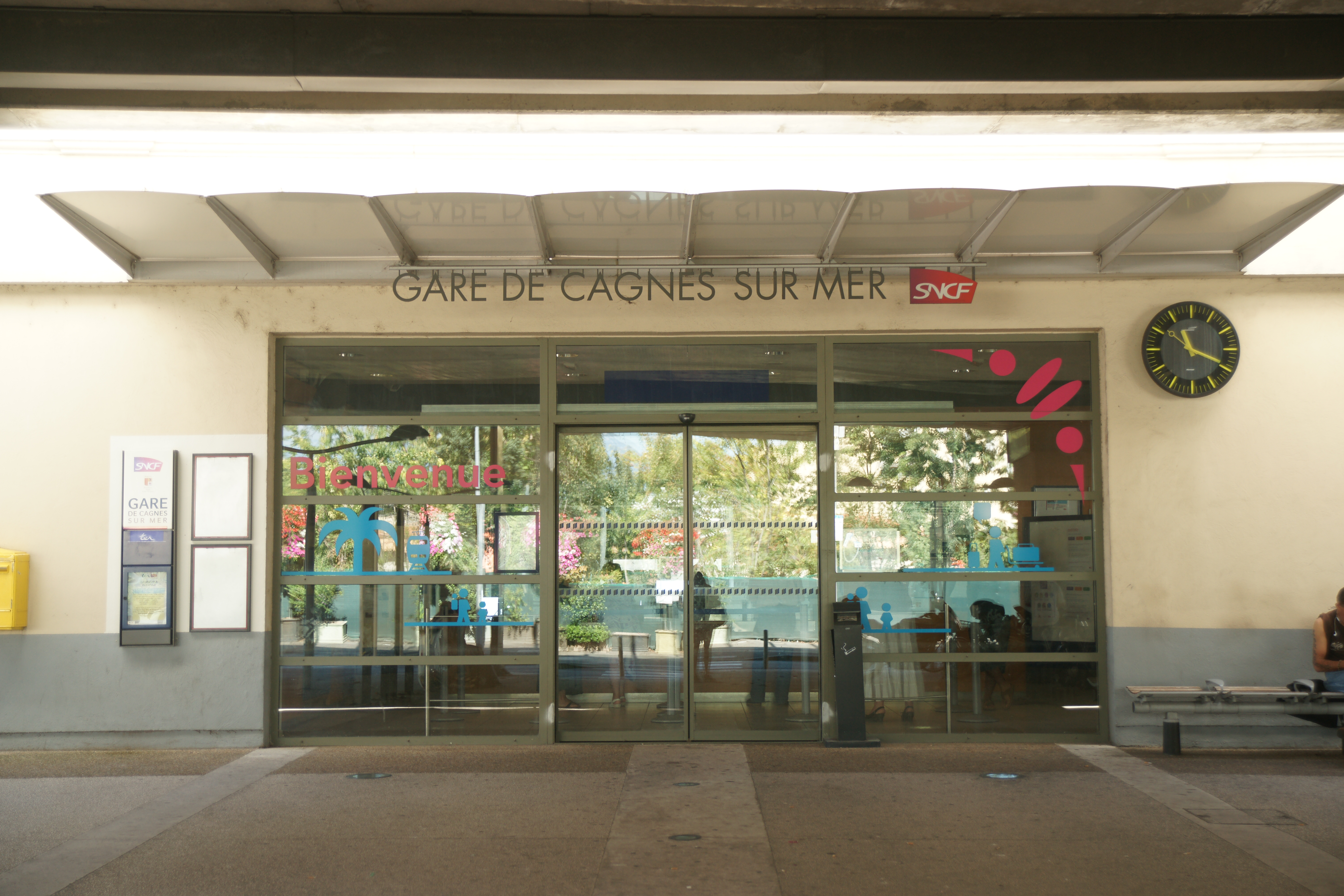 Gare de Cagnes-sur-Mer